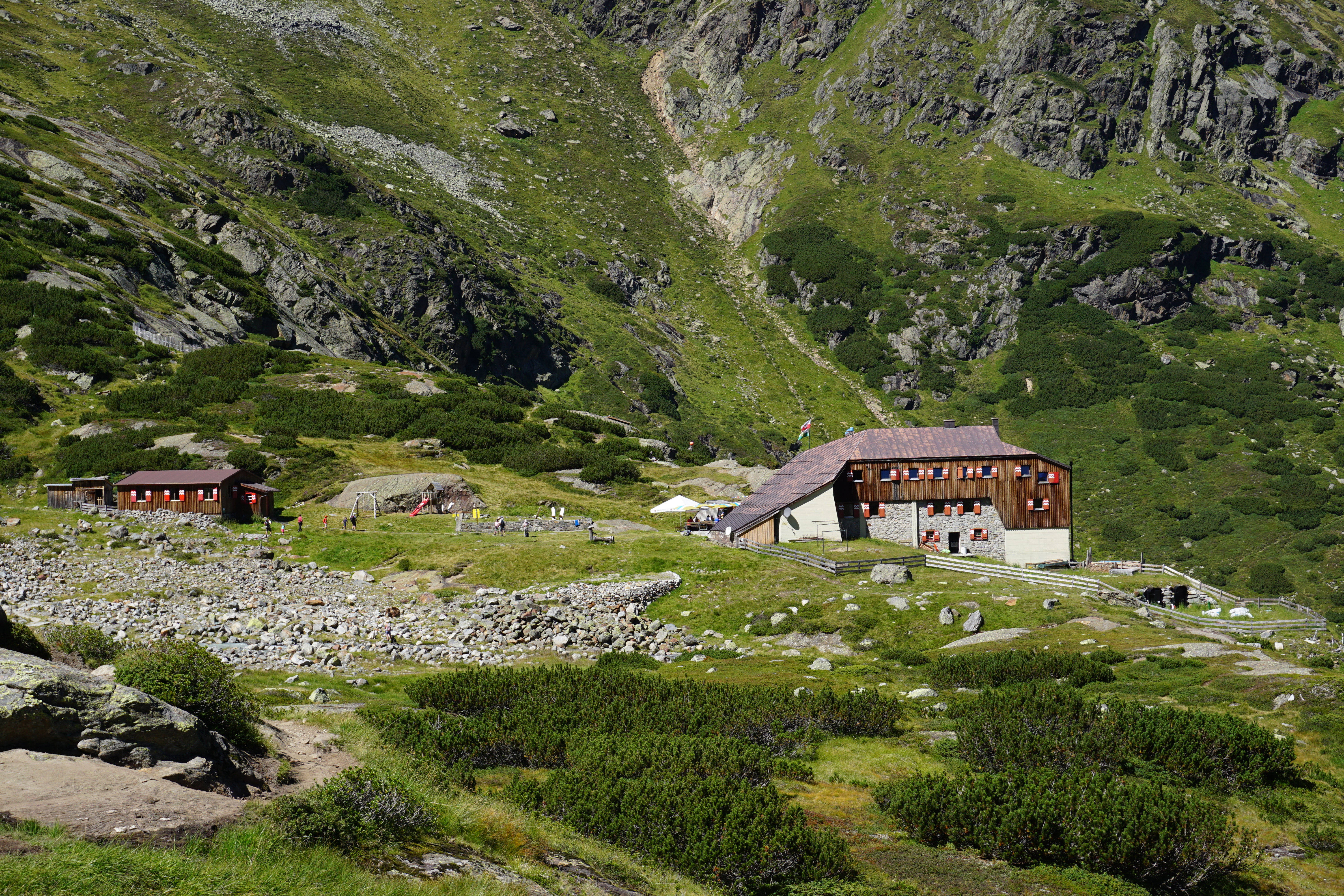 Blick auf die Sulzenauhütte